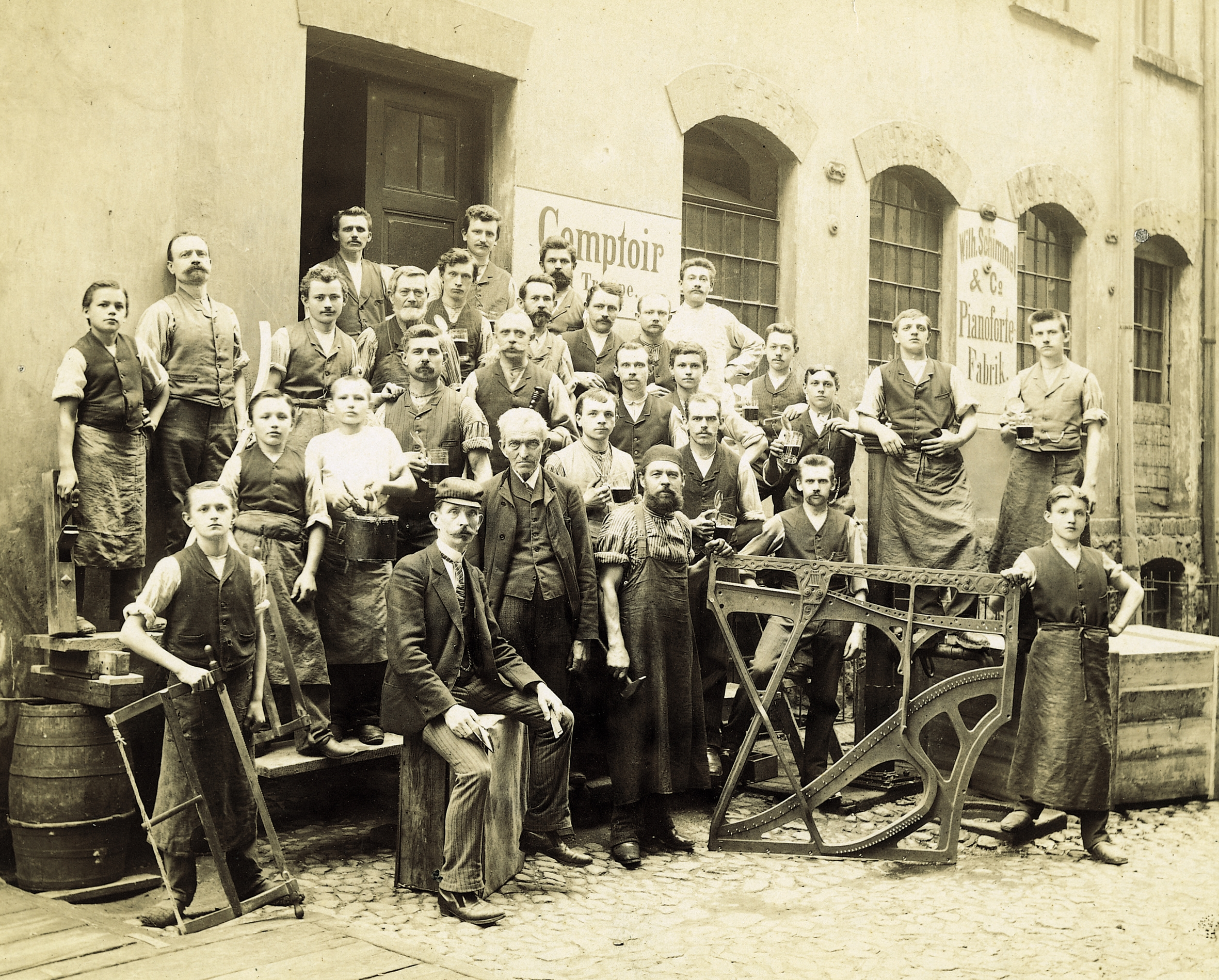 Wilhelm Schimmel mit Mitarbeitern vor seiner ersten eigenen Werkstatt in Leipzig-Reudnitz